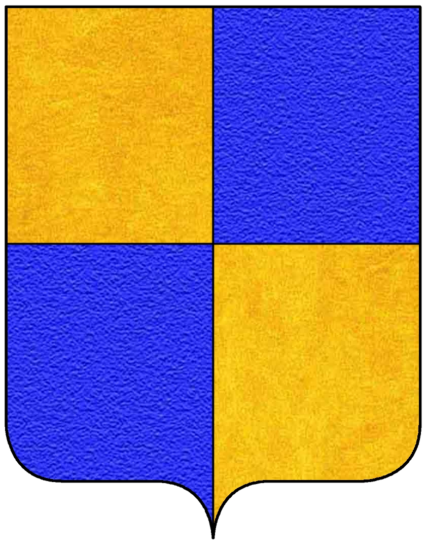 Stemma della famiglia Manfredi